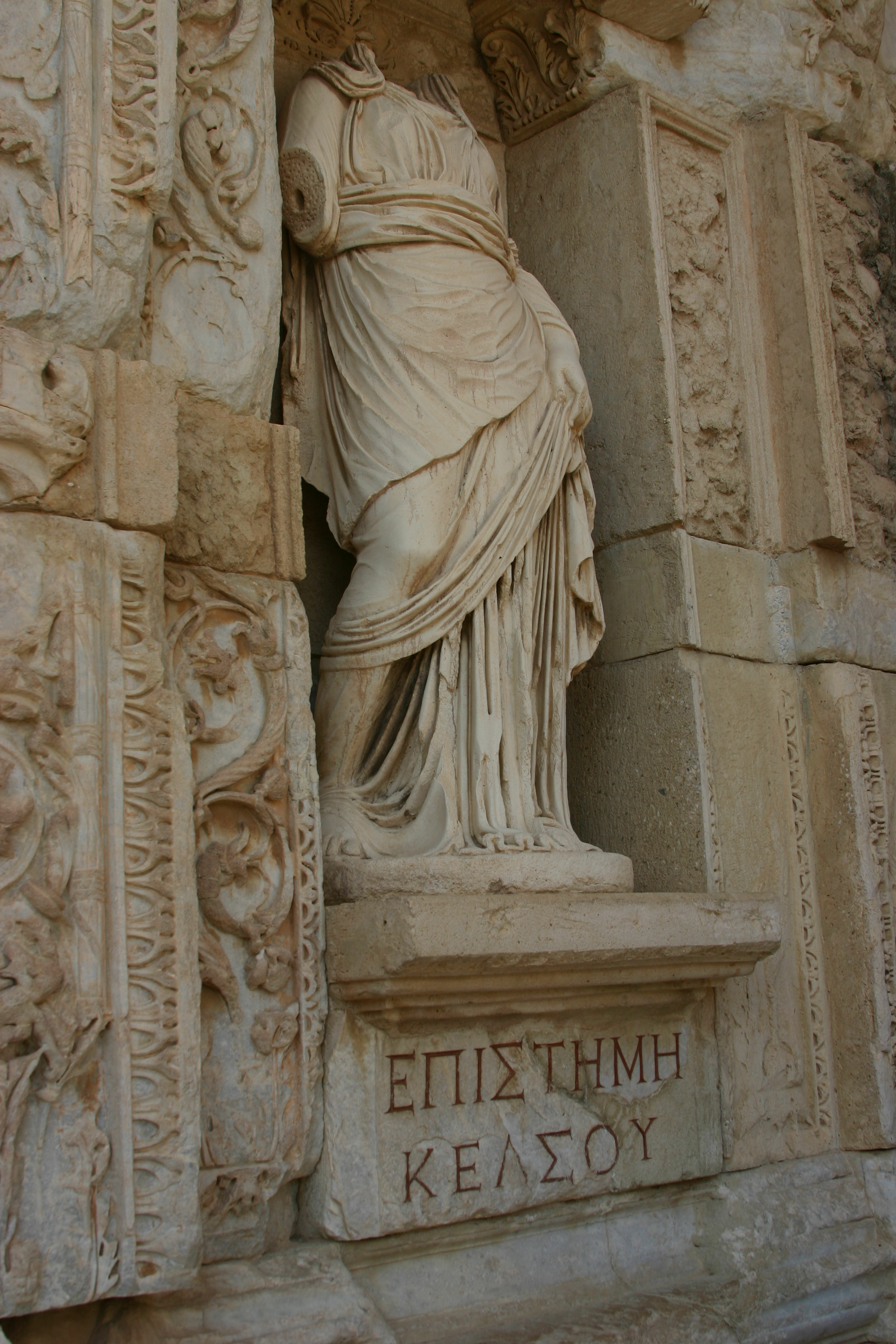 Episteme (Conhecimento) na Biblioteca de Celso